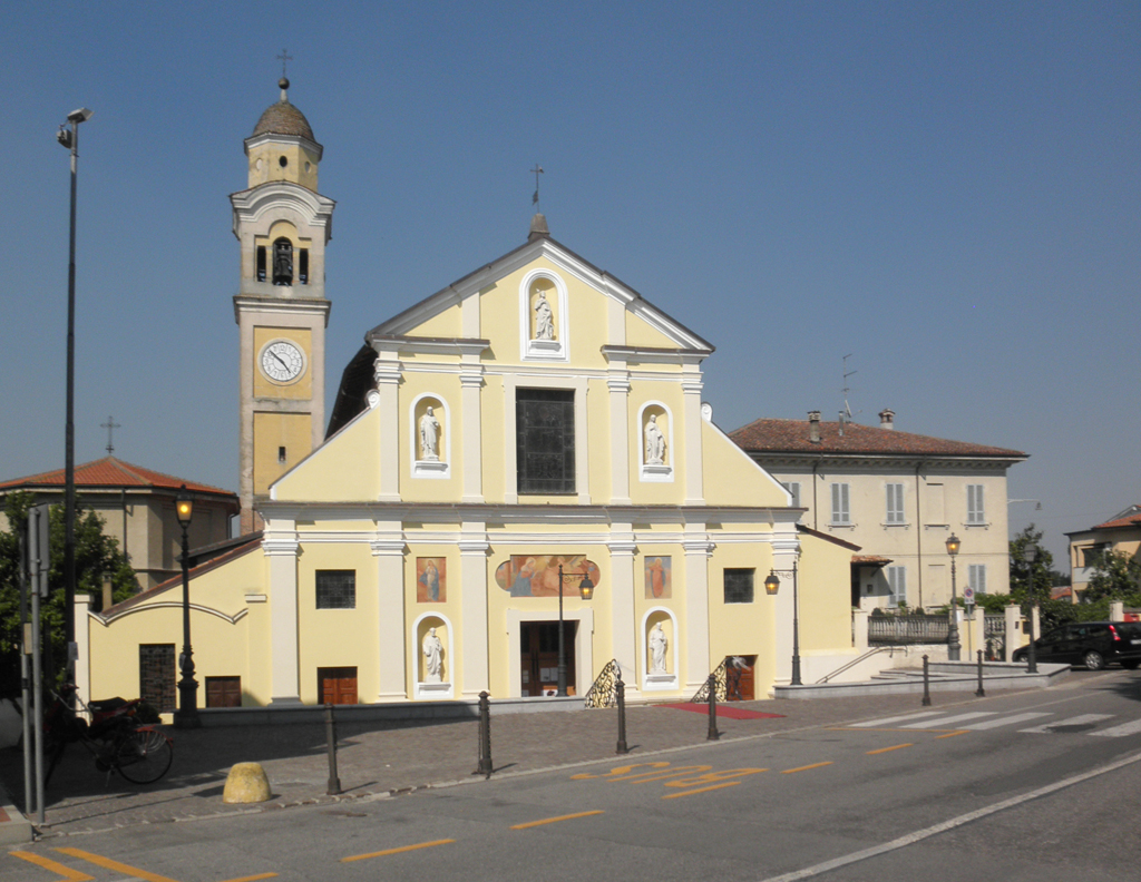 La chiesa parrocchiale di San Rocco a San Rocco al Porto